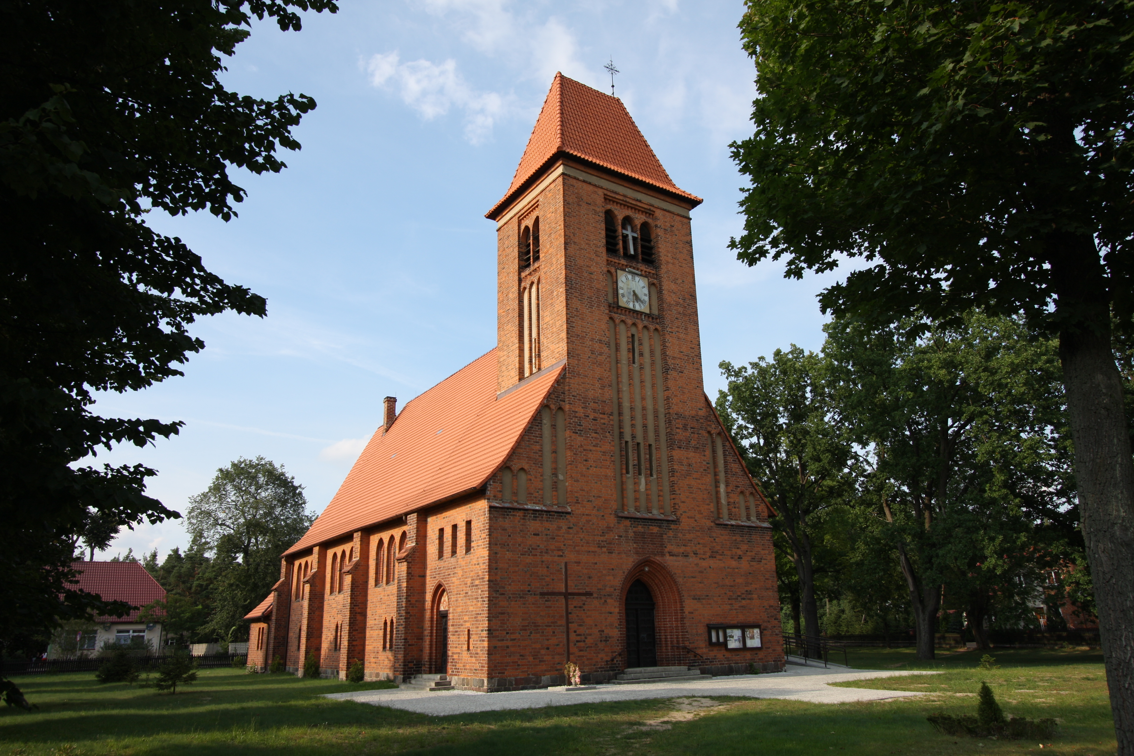 Stare Jastrzębsko, kościół ewangelicki, ob. rzym.-kat. par. p.w. NMP Królowej Polski, mur., 1914 (zabytek nr rejestr. 2574/A)